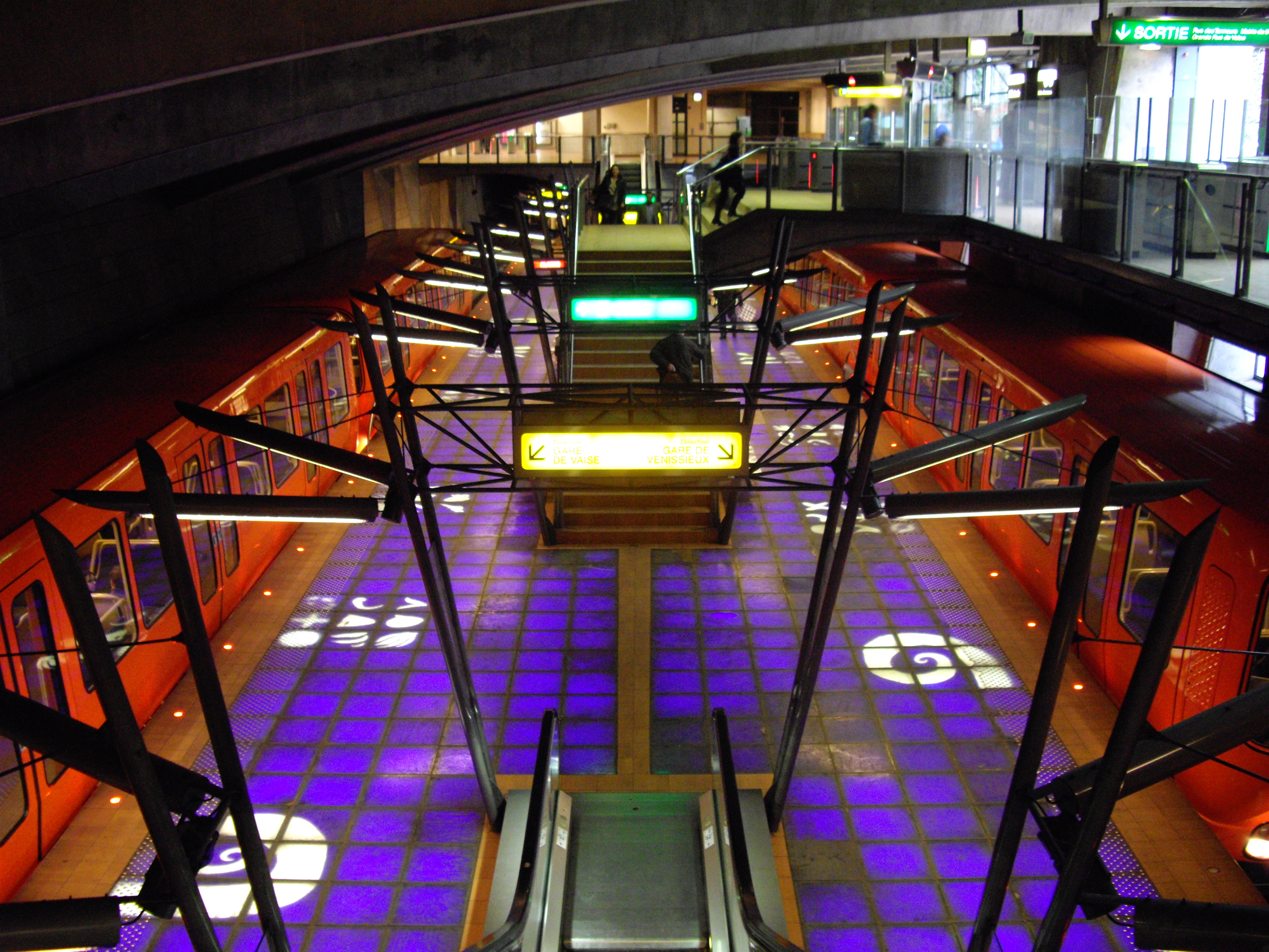 MPL85 sur la ligne D du métro de Lyon, à la station Valmy. Cette station est à quai central. Chaque rame est à une extrémité du quai.